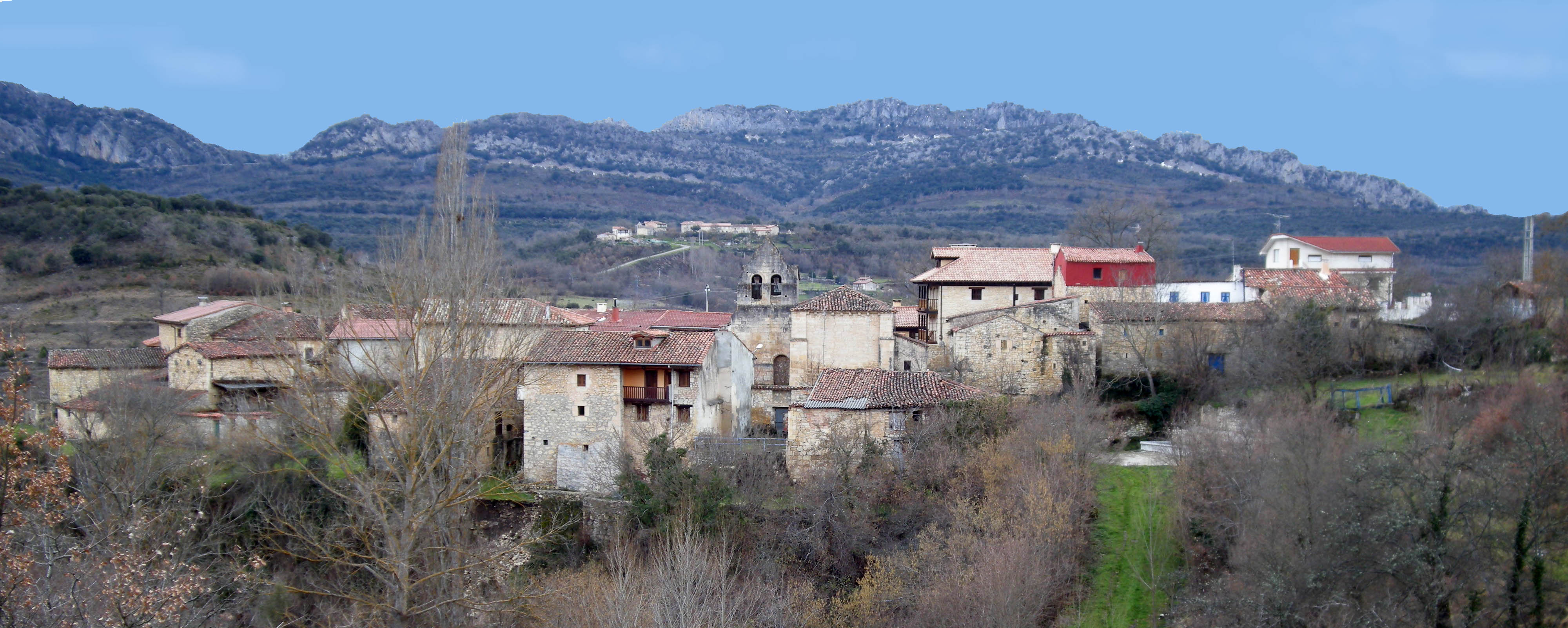 Panorámica de Peñalba